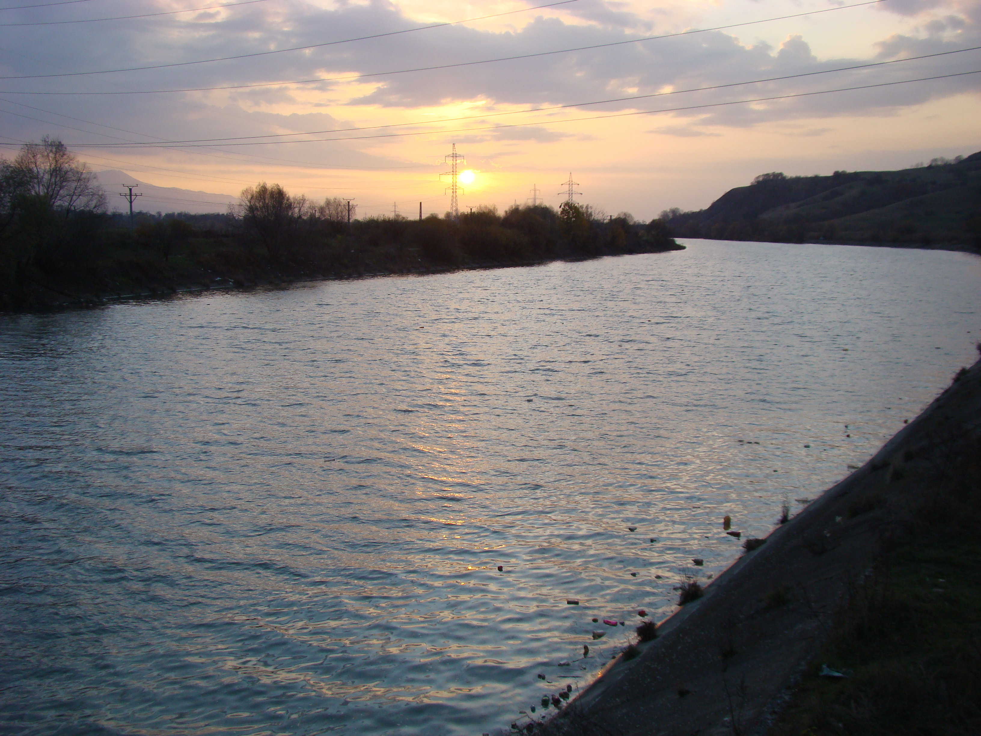 the Olt near Cincșor (Kleinschenk) village